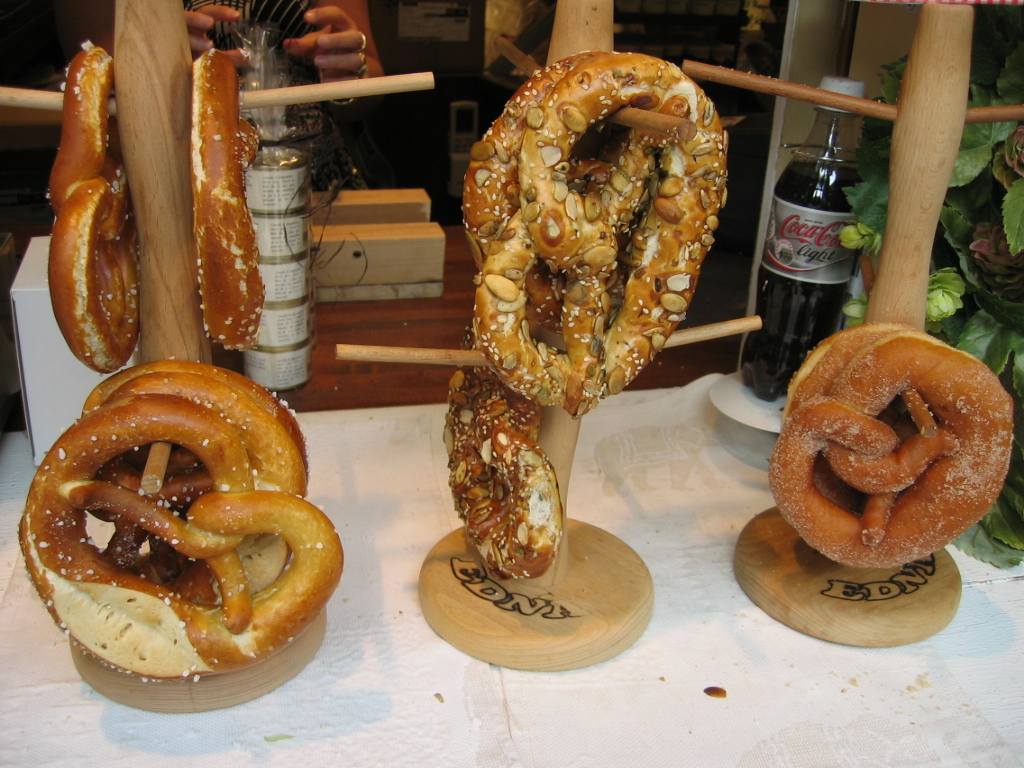 Riquewihr - Village de caractère - Alsace - France